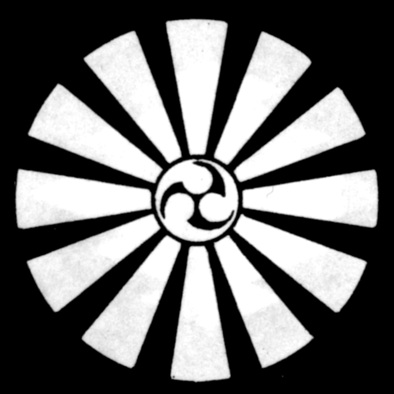 十二つ日足に三つ巴